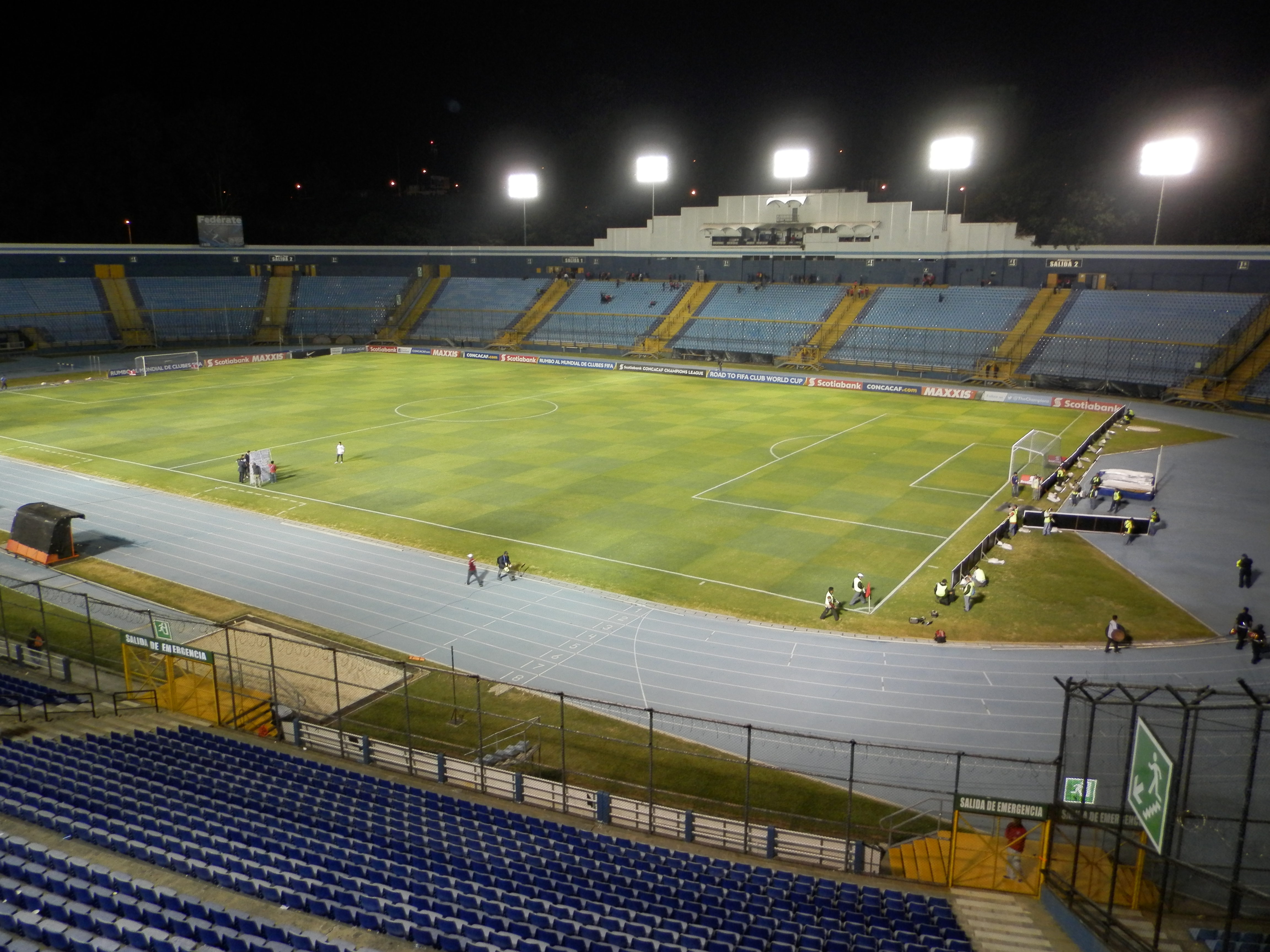 Una imagen del Mateo Flores de noche. - 10A Avenida, Guatemala 01005, Guatemala